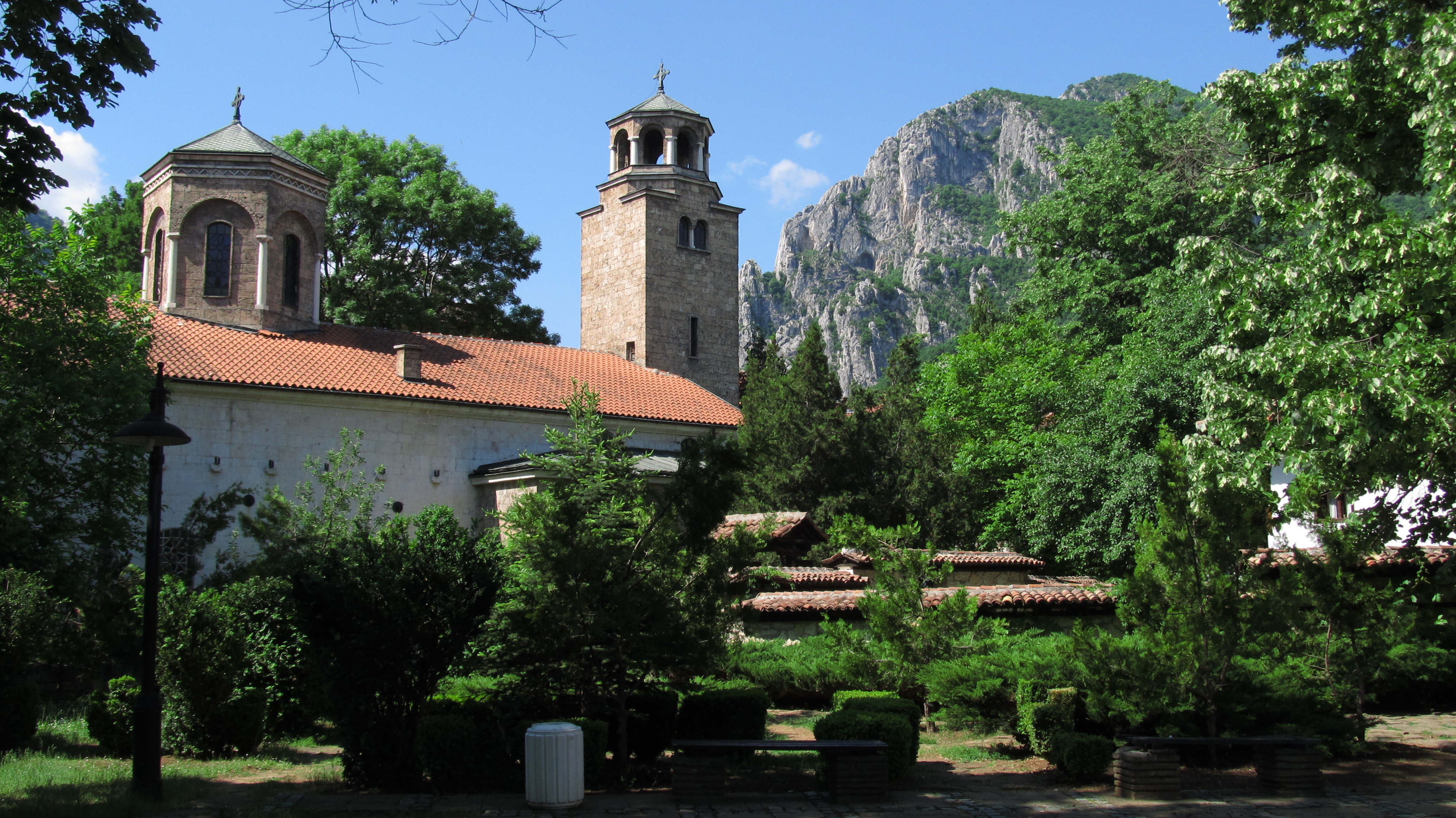 Храм "Свето Възнесение" - Враца